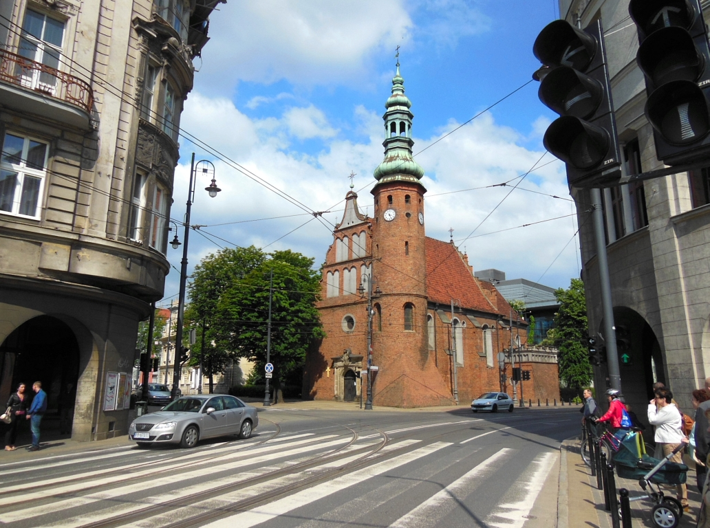 Kościół p.w. Wniebowzięcia Najświętszej Marii Panny w Bydgoszczy (zbud. 1582-1615, do 1835 r. kościół klasztorny klarysek bydgoskich)